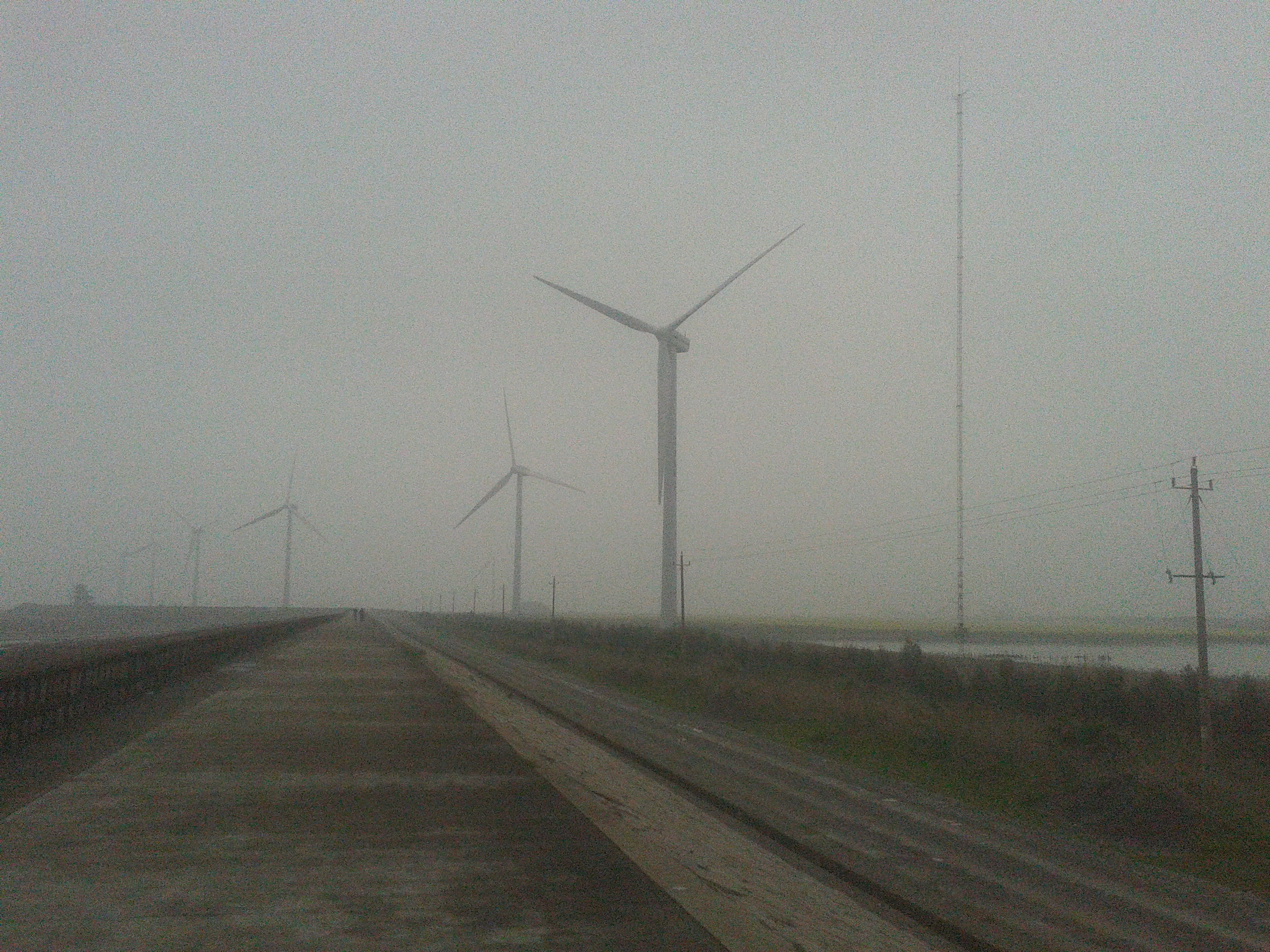 Many Windmills in Donghai Tang,Wenling,Zhejiang,China. 浙江温岭东海塘的许多风车。